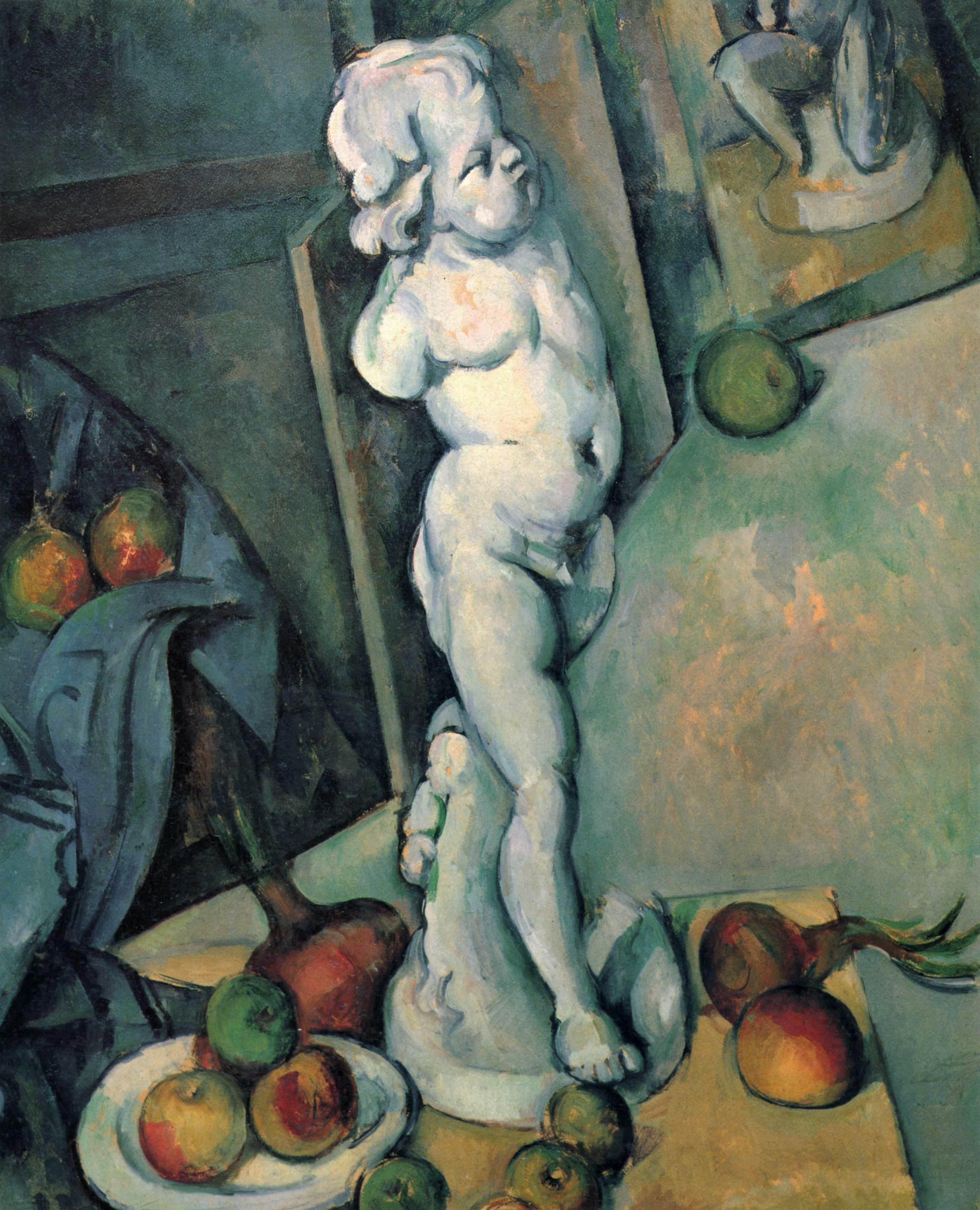 Stilleben mit Putto